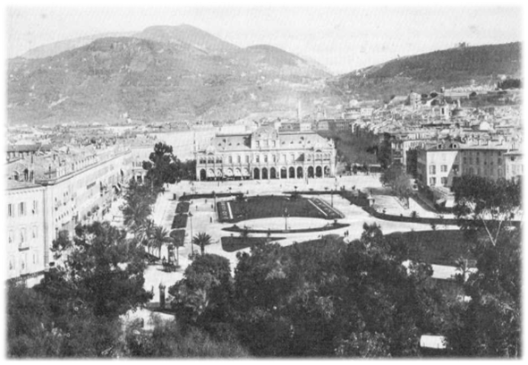 La place Masséna en 1900, avec le casino municipal et les jardins